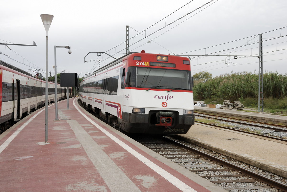 Renfe Class 447 in Blanes